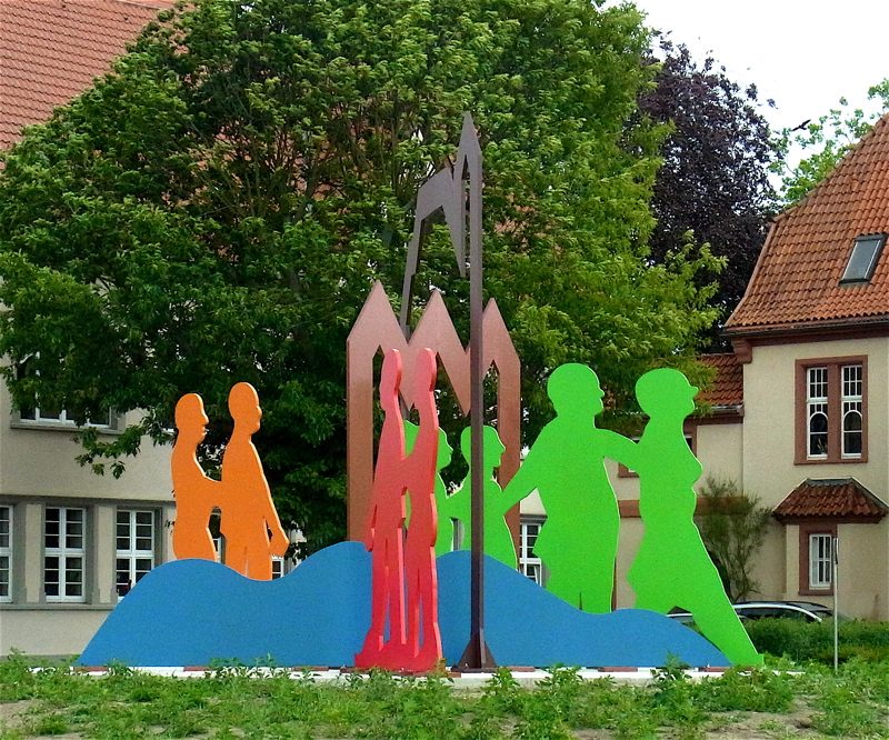 stahlskulpturen aus 30mm stahl,lackiert 400x400 cm 2011 in verden,Deutschland